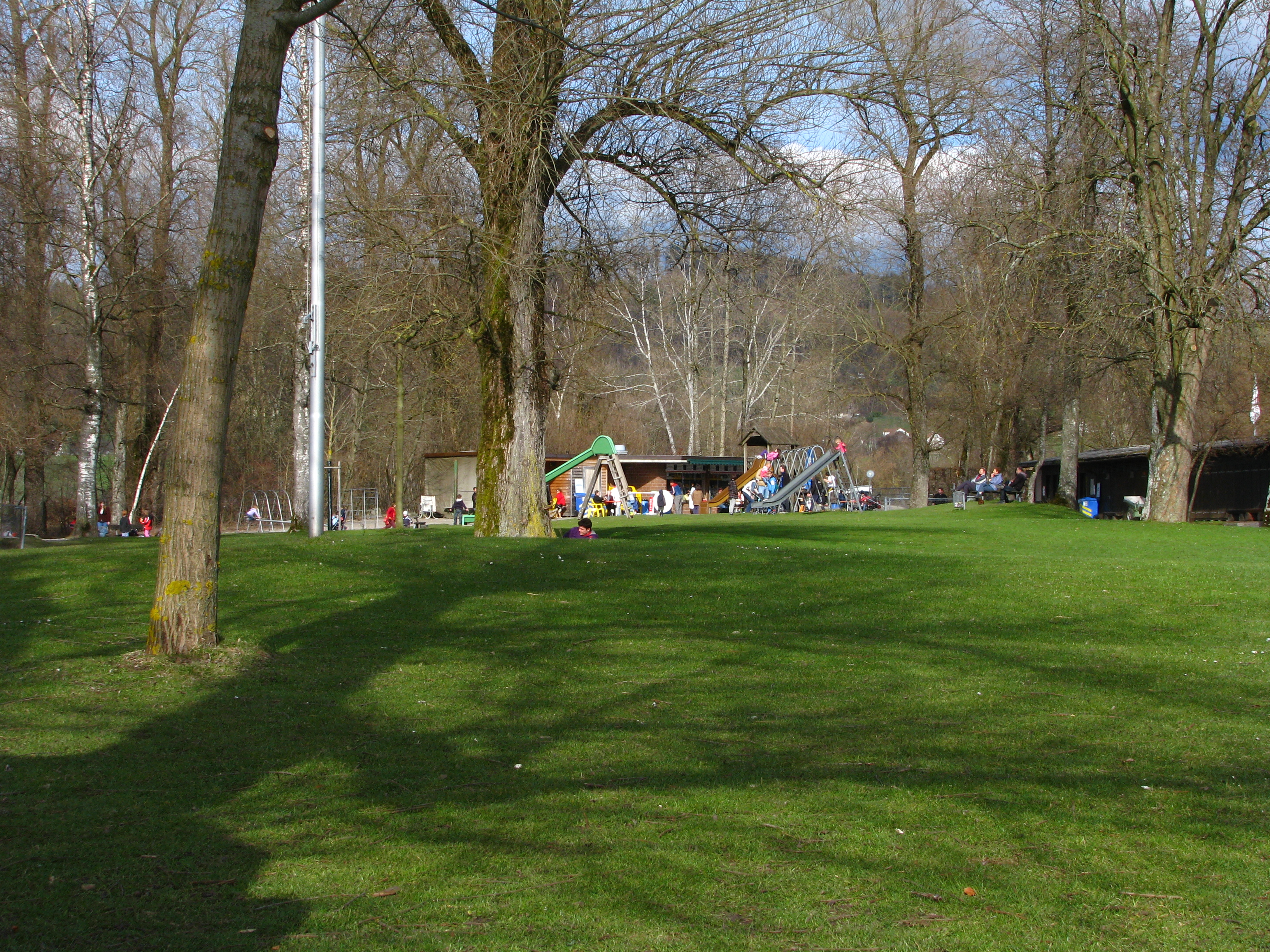 Strandbad in Auslikon (Switzerland)